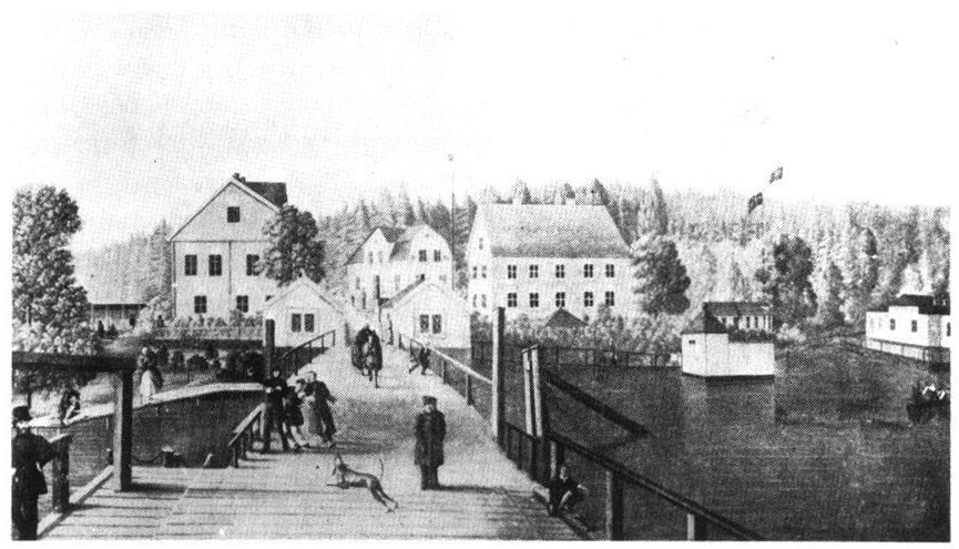 Området vid Lidingöbro värdshus vid Kaknäs, Gärdet, Stockholm. Vy från Lidingöbron byggd 1803 mellan Larsberg och Kaknäs. Oljemålning av Nils G. Dahlbom, 1860.